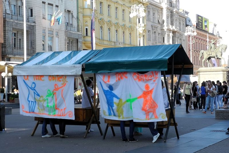 Štand inicijative U ime obitelji na Trgu bana Jelačića u Zagrebu